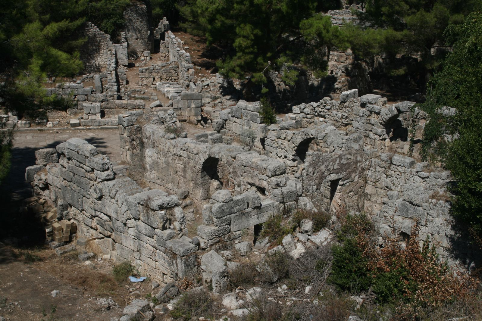 Phaselis